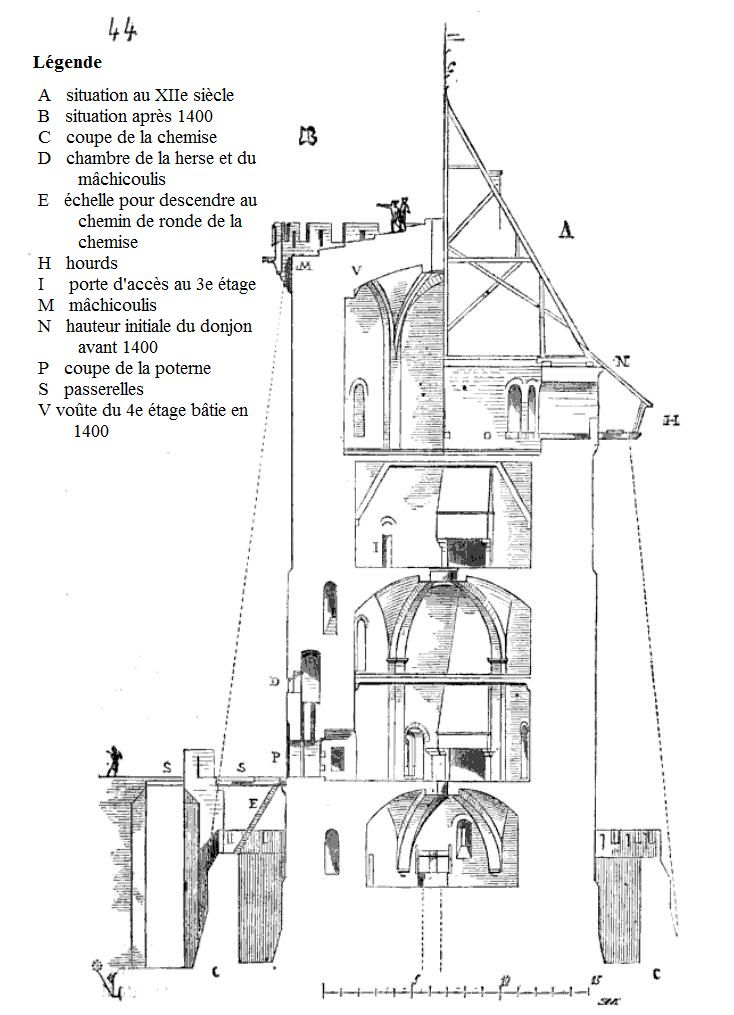 Coupe longitudinale du donjon du château de Montépilloy (60), aujourd'hui ruinée. A gauche, la situation après les modifications autour de l'an 1400 ; à droite, la situation du XIIe siècle. Légende ajoutée d'après les indications dans le texte du livre.